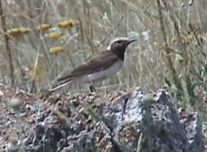 Pied Wheatear, near Kaliakra, Bulgaria, July 2003